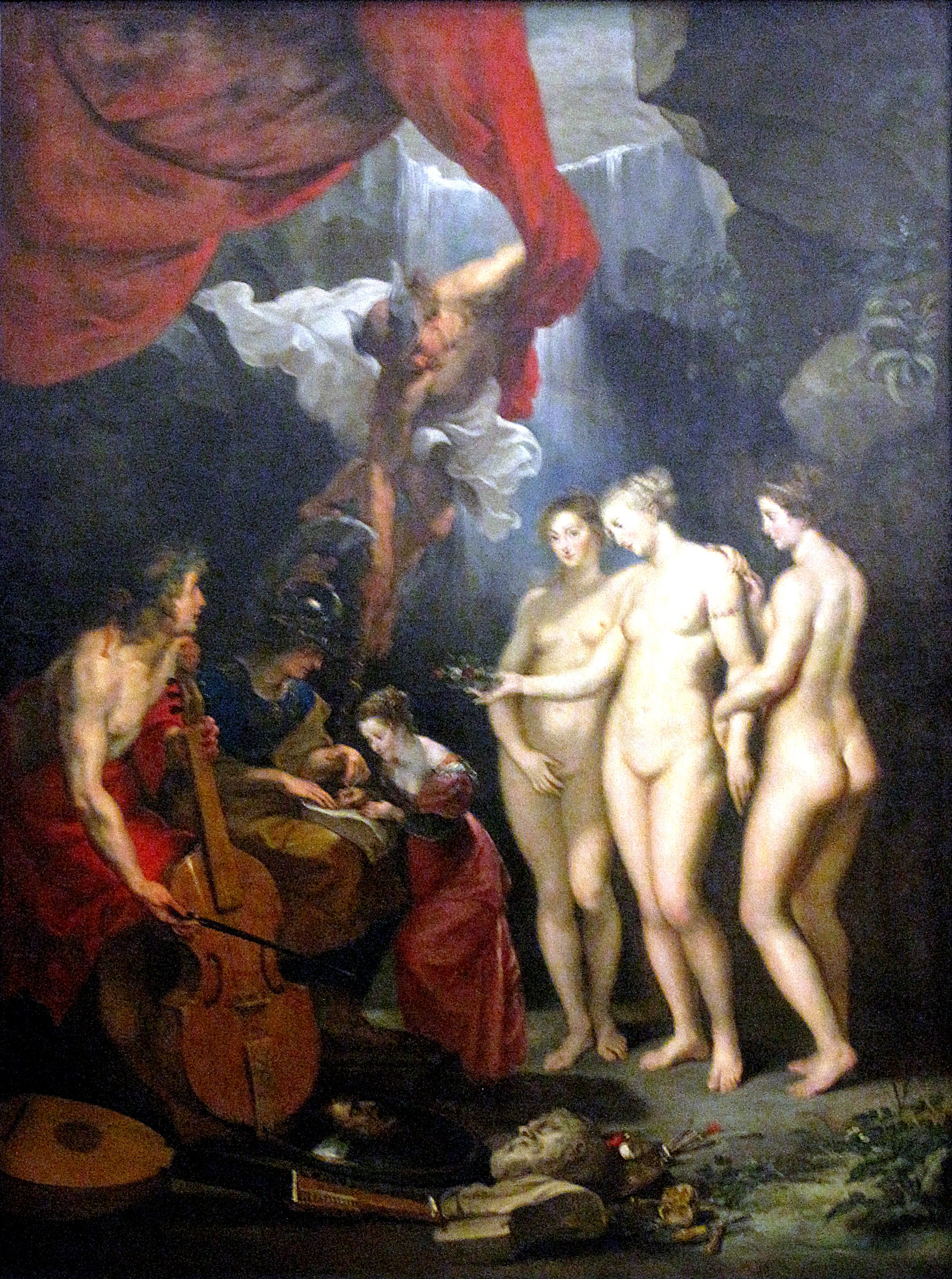 Peinture flamande au Louvre, Paris